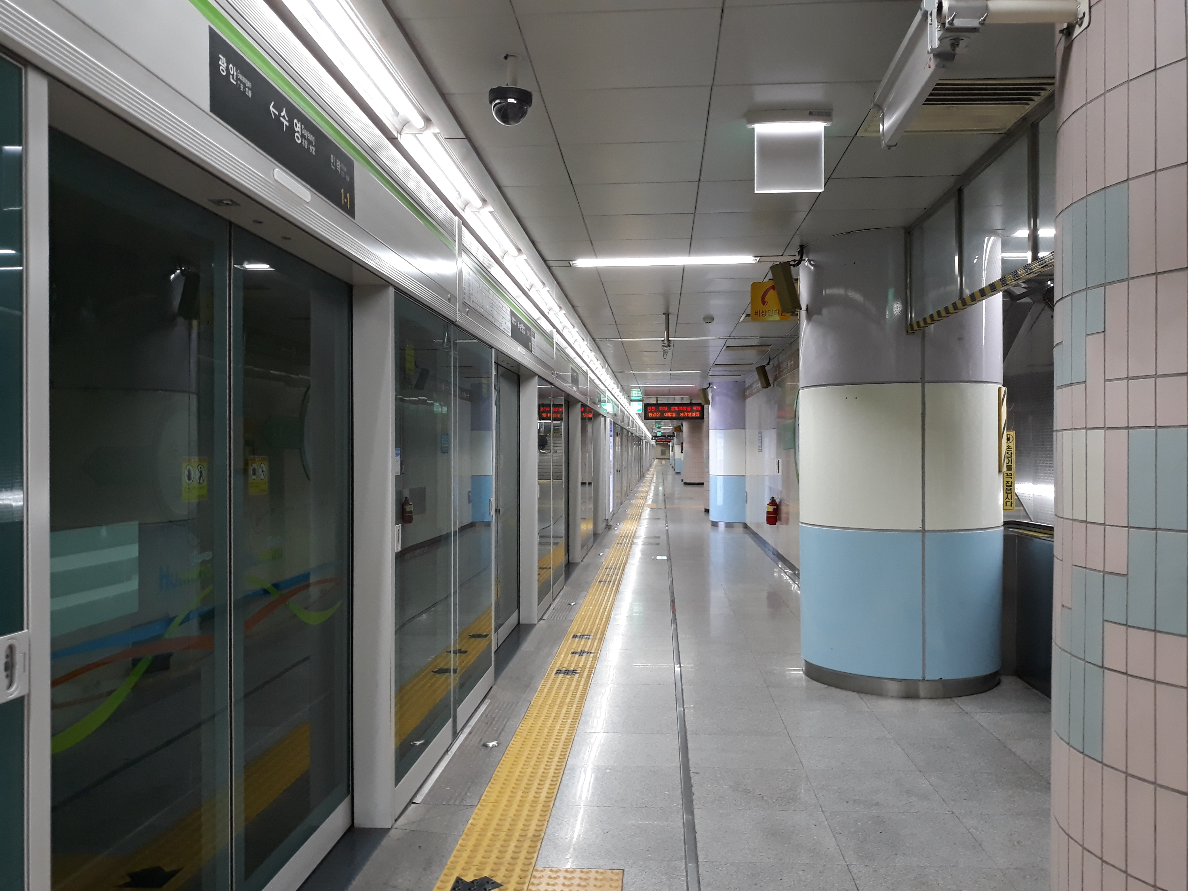 부산 도시철도 2호선 수영역 양산 방면 승강장